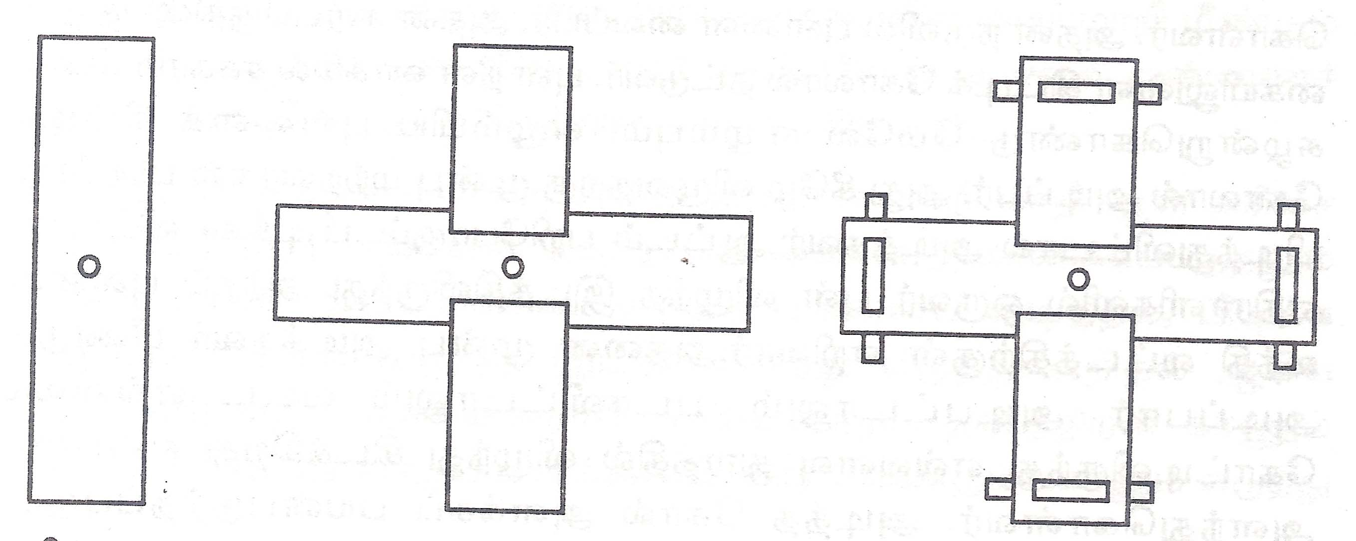 self creation பனையோலைக் காற்றாடி, கோட்டுருவப் படம், மறைகின்ற விளையாட்டுகள் என்னும் எனது நூலிலிருந்து எடுத்துப் பதிவேற்றப்பட்டுள்ளது.